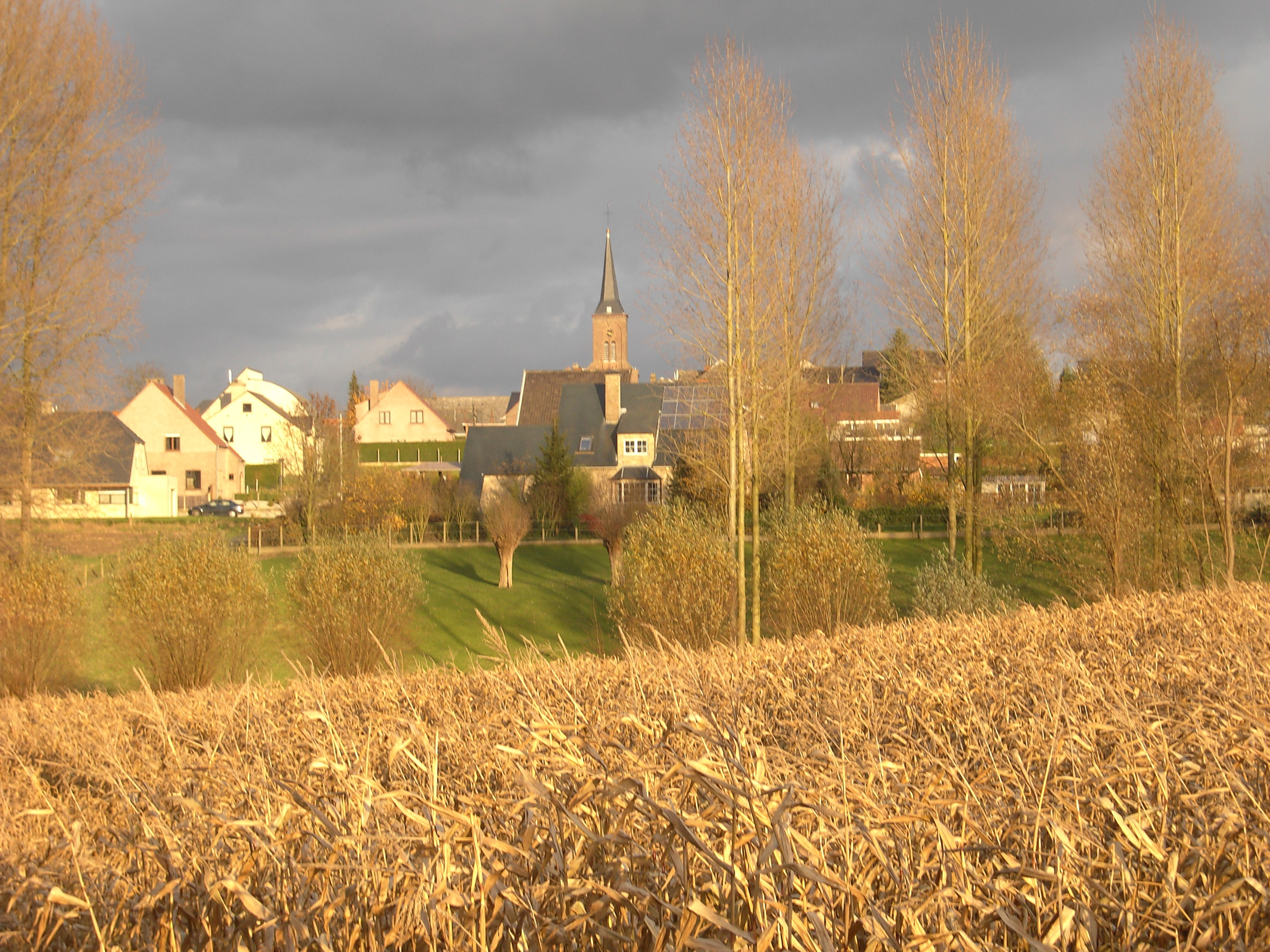 Heldergem - Haaltert - Oost-Vlaanderen - België - Zonnige herfstdag 2008